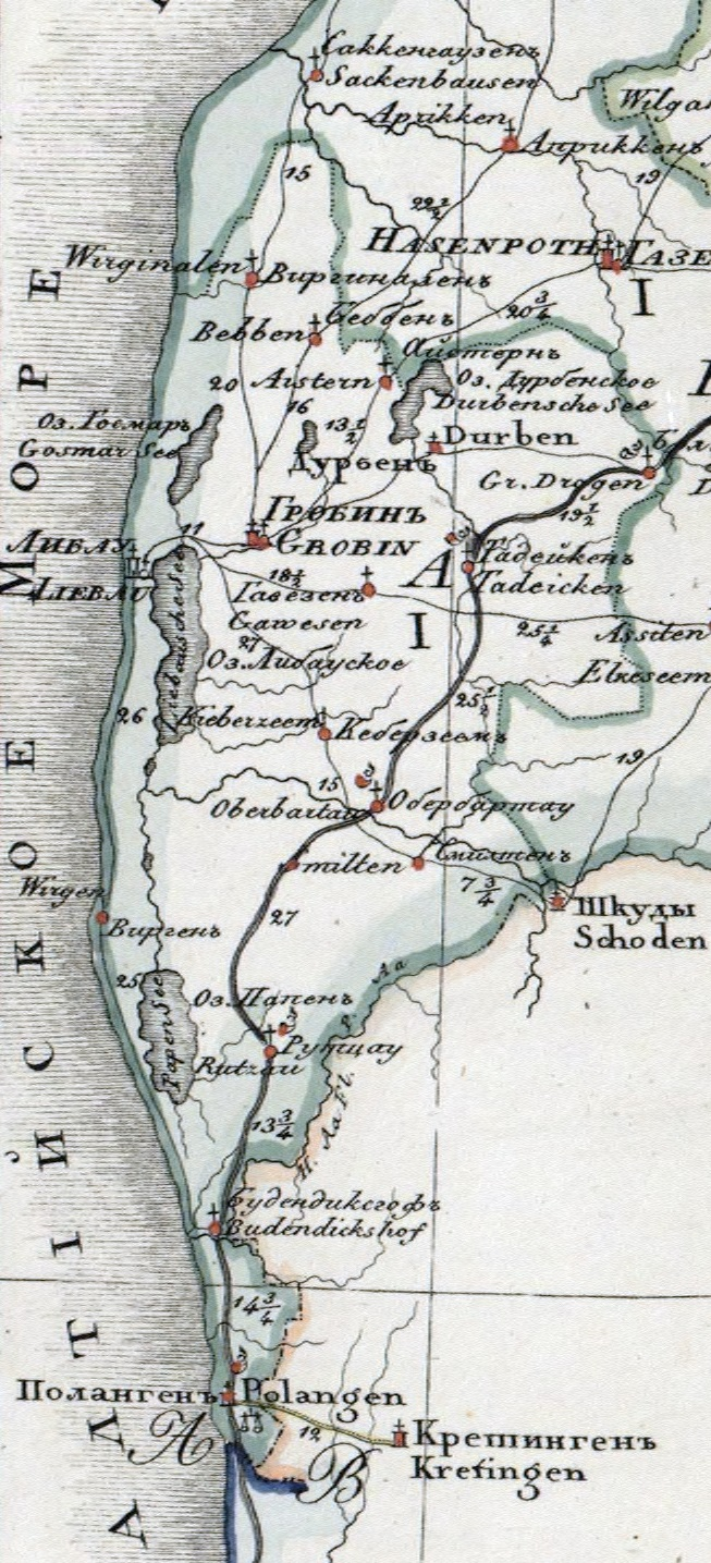 Grobiņas apriņķis (1820). Izgriezts no 1820 Курляндская Губерния.jpg